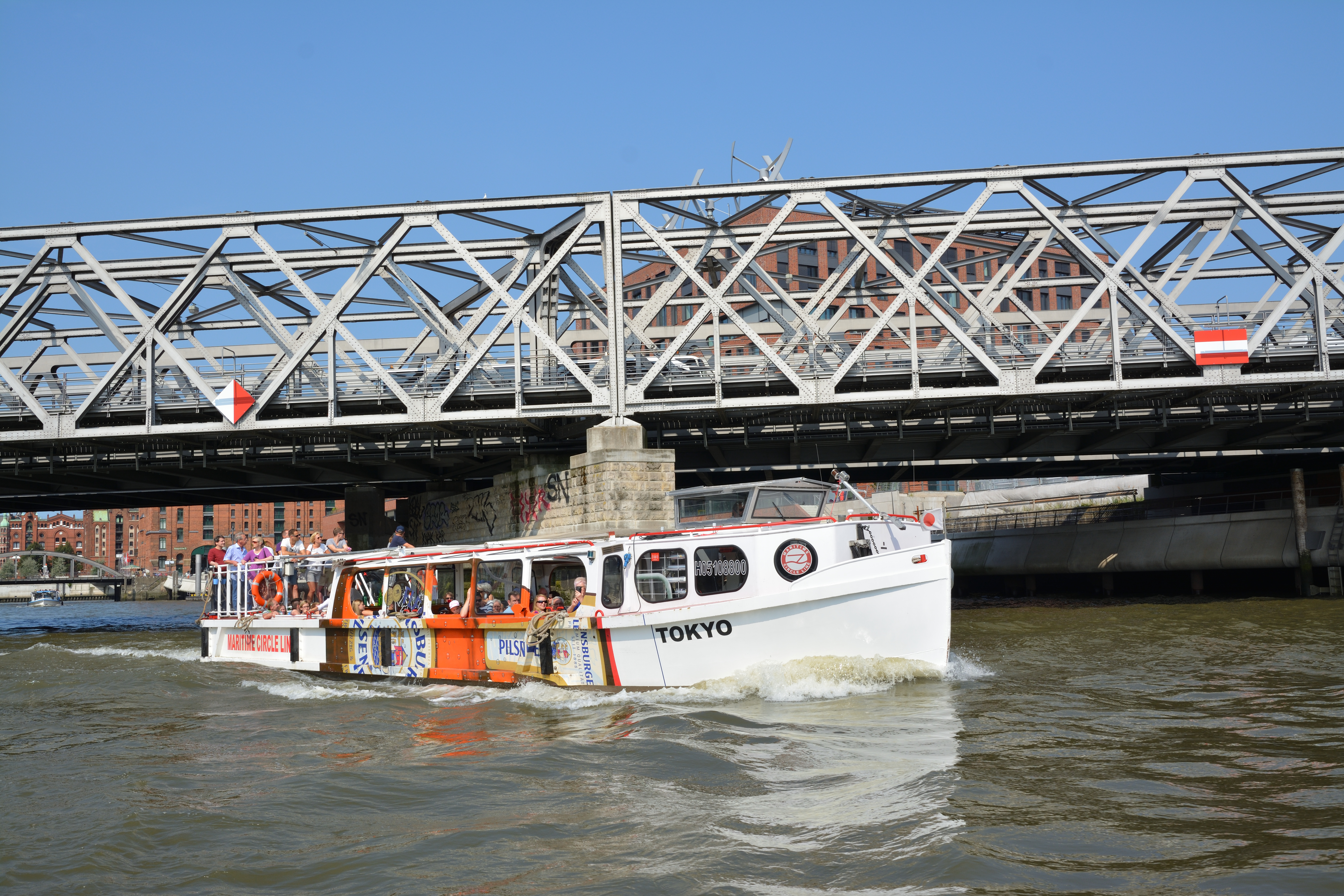 Impressionen einer Barkassenfahrt im August 2016 durch den Hamburger Hafen.